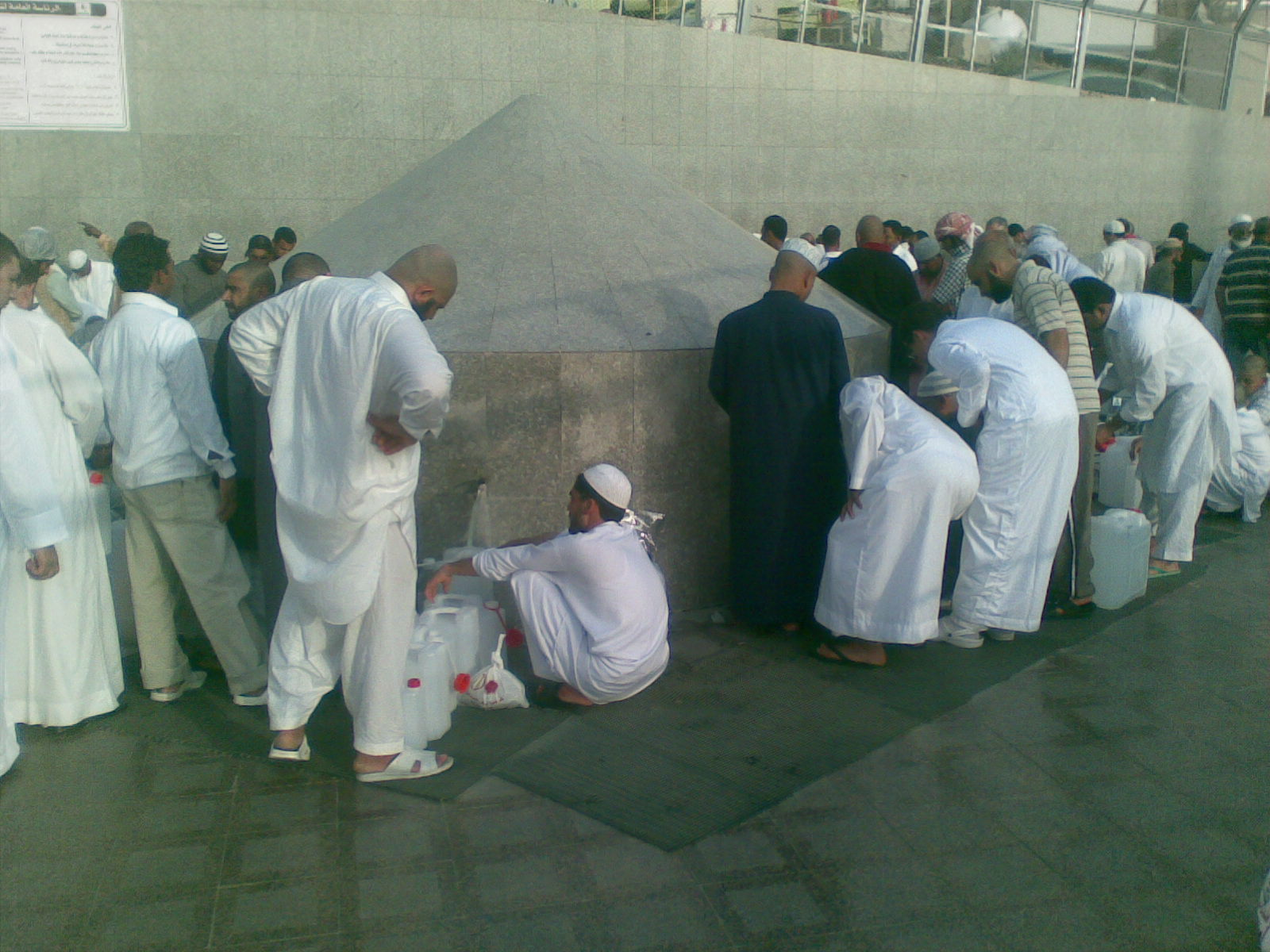 വിശ്വാസികൾ മക്കയിൽ നിന്നും സംസം വെള്ളം ശേഖരിക്കുന്നു